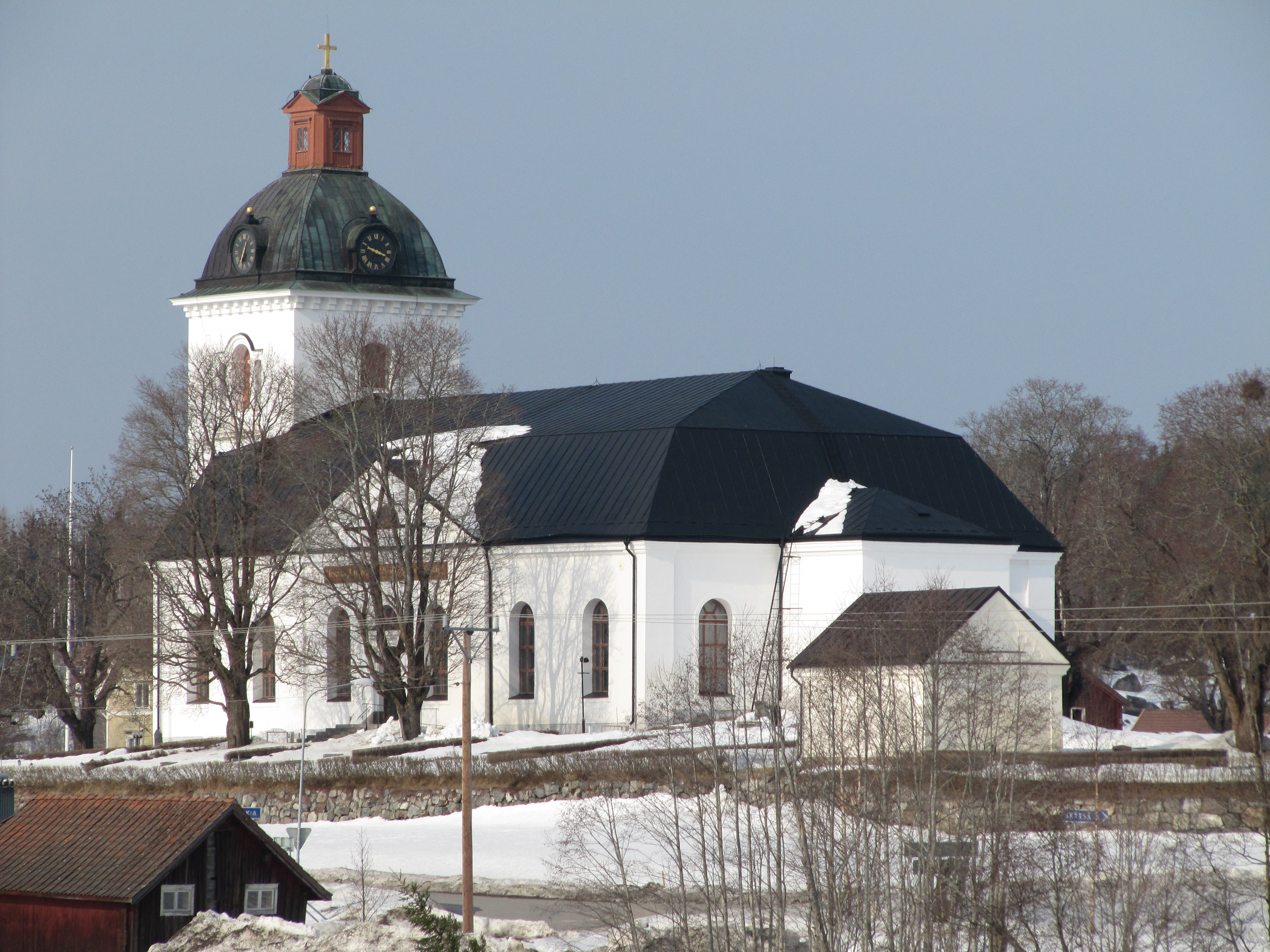 Norrala kyrka